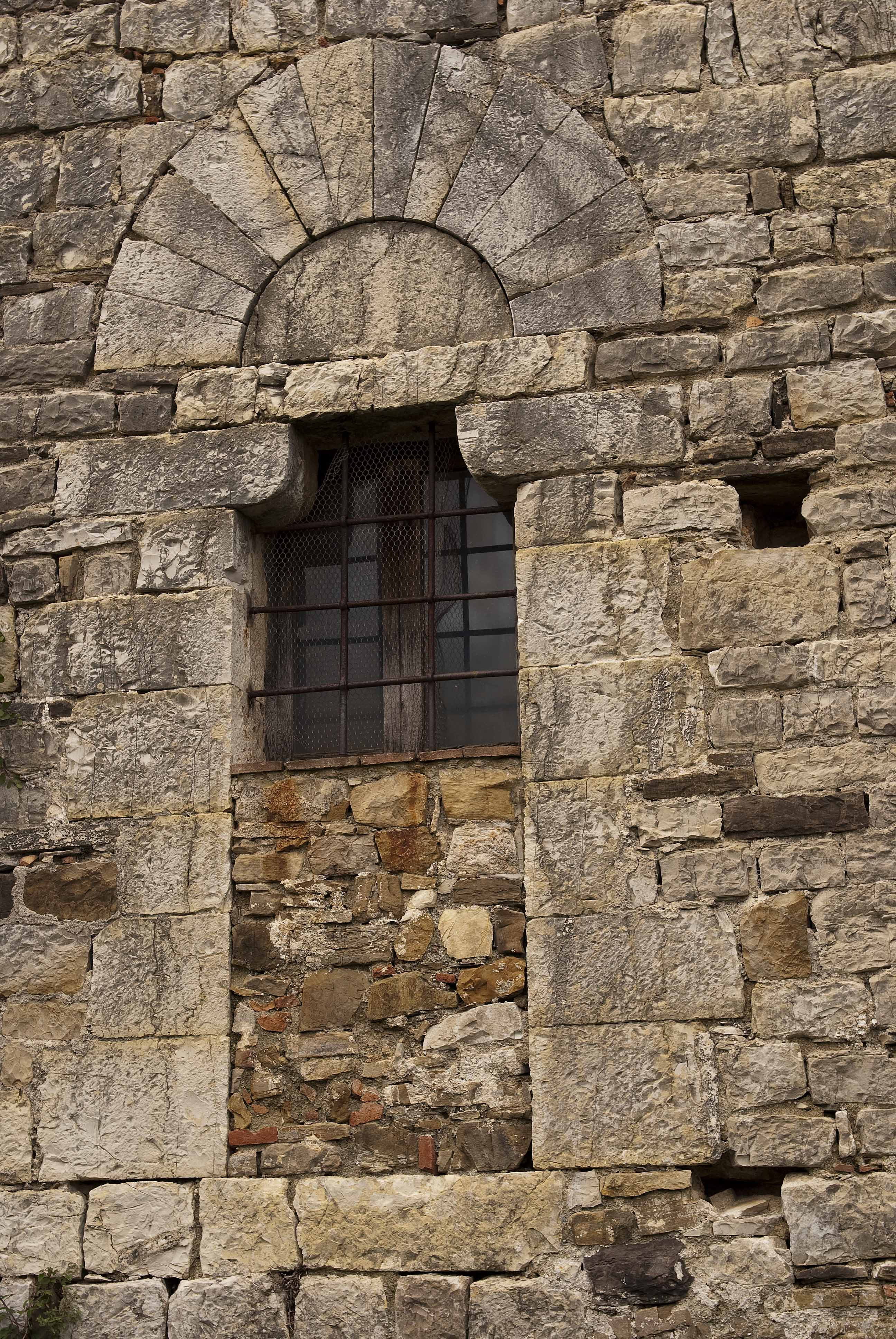 Portale sinistro della chiesa di San Giorgio allo Spadaio -Barberino Val d'Elsa - Firenze